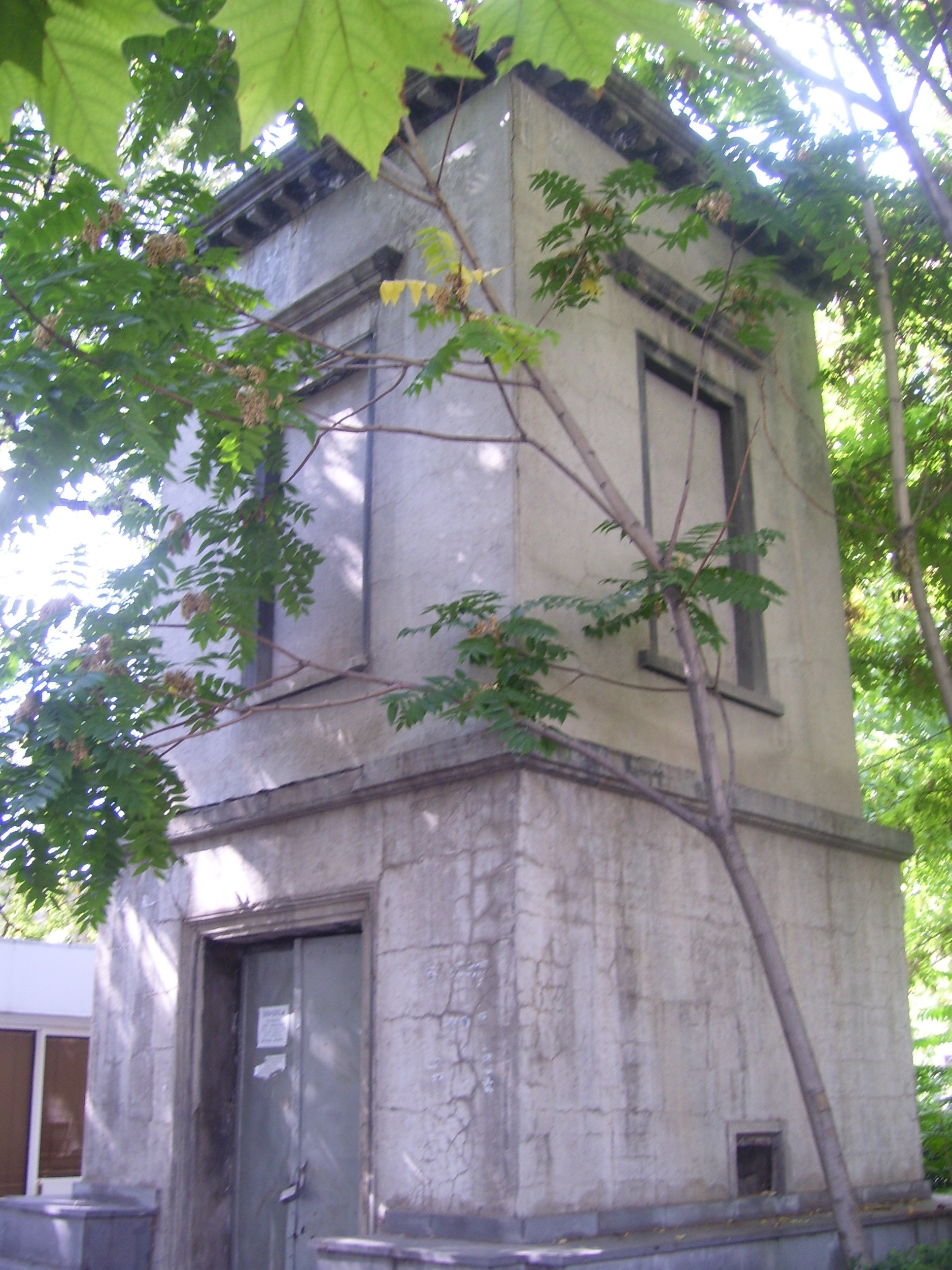 Երևան Տրանսֆորմատորային կայան 1930 թ. Հանրապե-տության և Ստ. Շահումյանի անվ. հրապարակների միջև, Ստ. Շահումյանի անվ. զբոսայգում, Ճարտ.` Ն. Բունիաթյան, 6/87